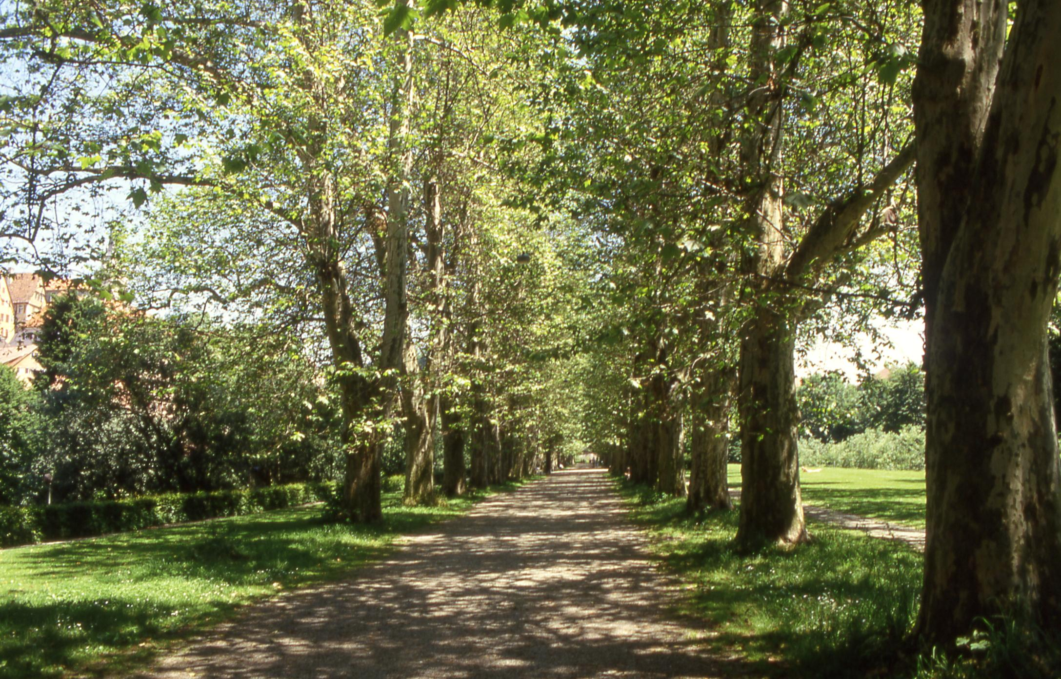 Die Platanenallee auf der Tübinger Neckarinsel. Ort zum Spazierengehen und Erholen; eine der Parkanlagen der Stadt.